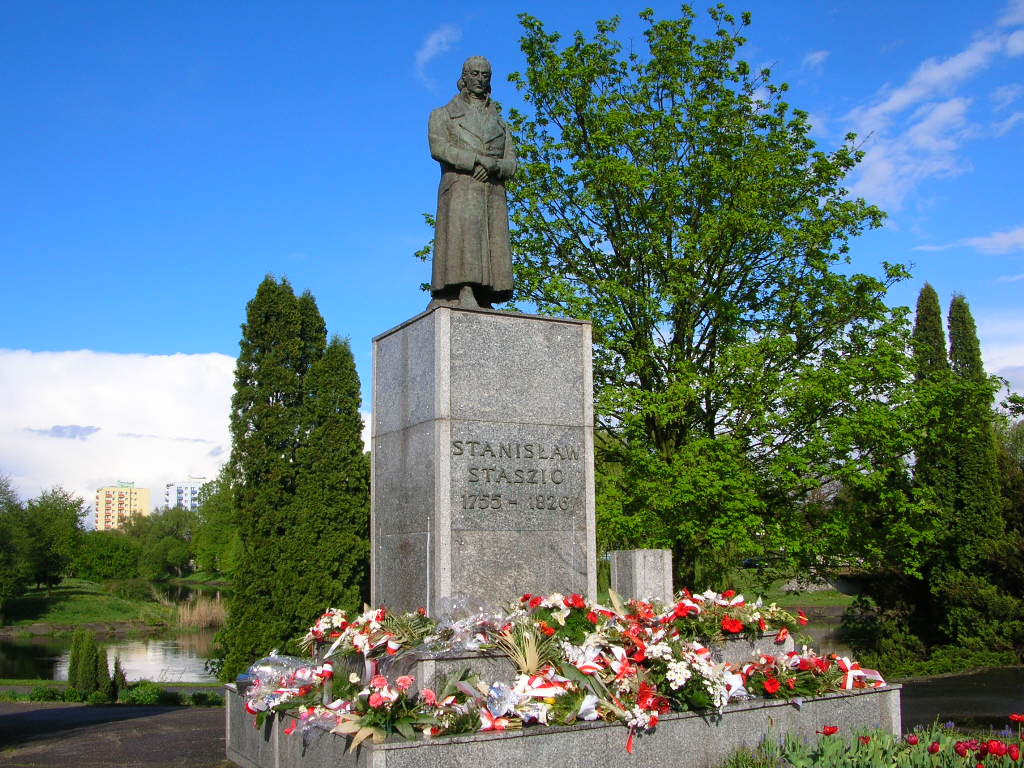 Piła - Pomnik Stanisława Staszica Autor - Bartek Wawraszko